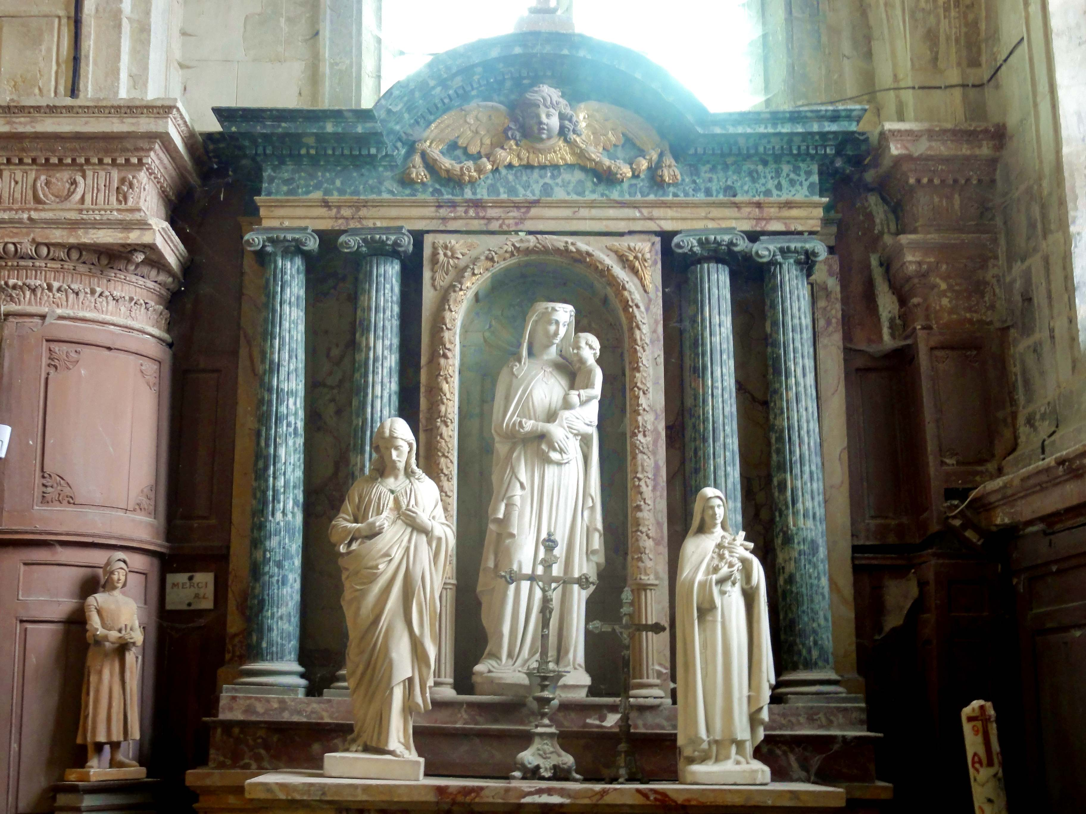 Bas-côté sud, 6e travée, retable de la Vierge.